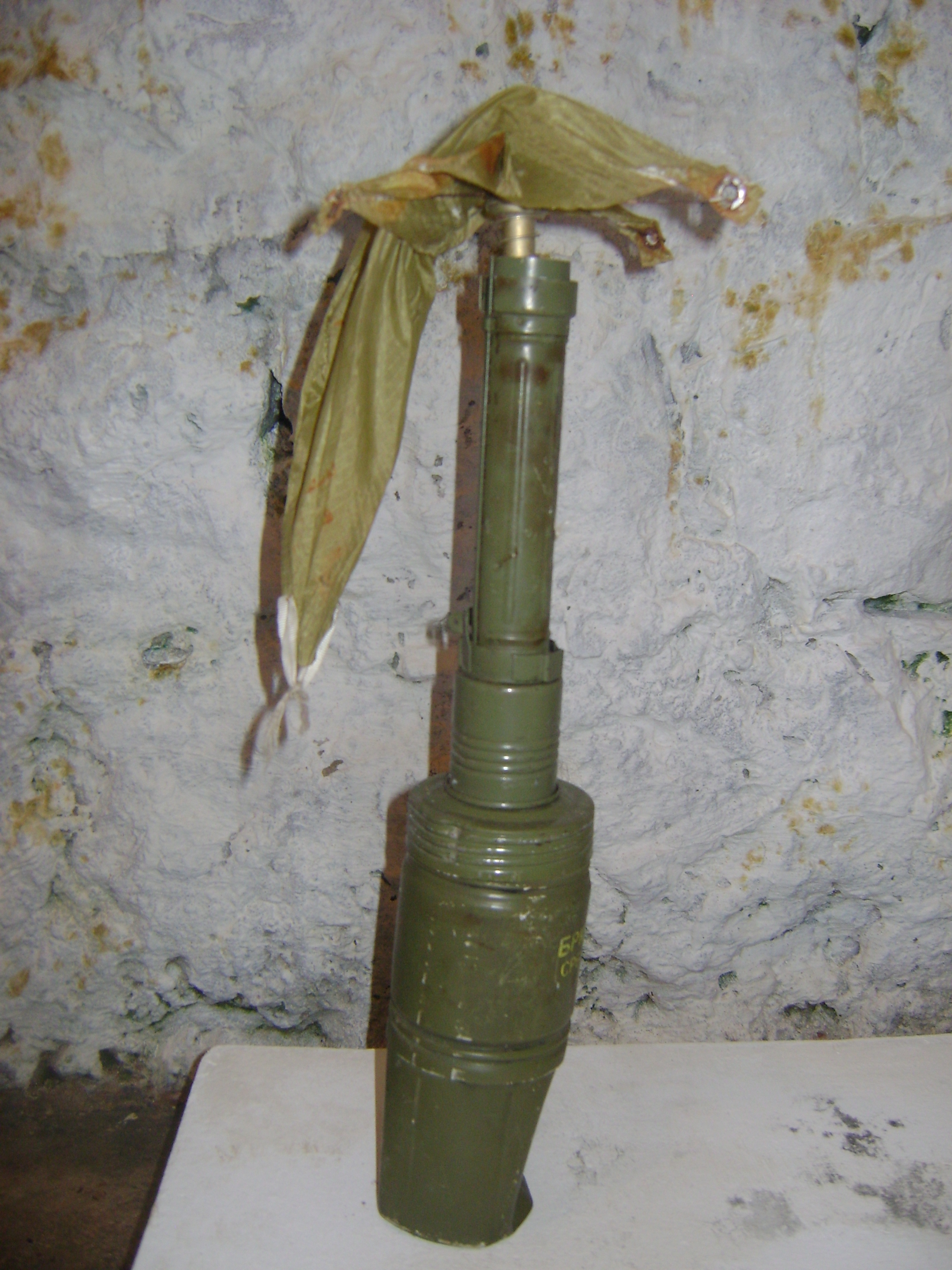 Yugoslavian H.E.A.T Hand Grenade M79